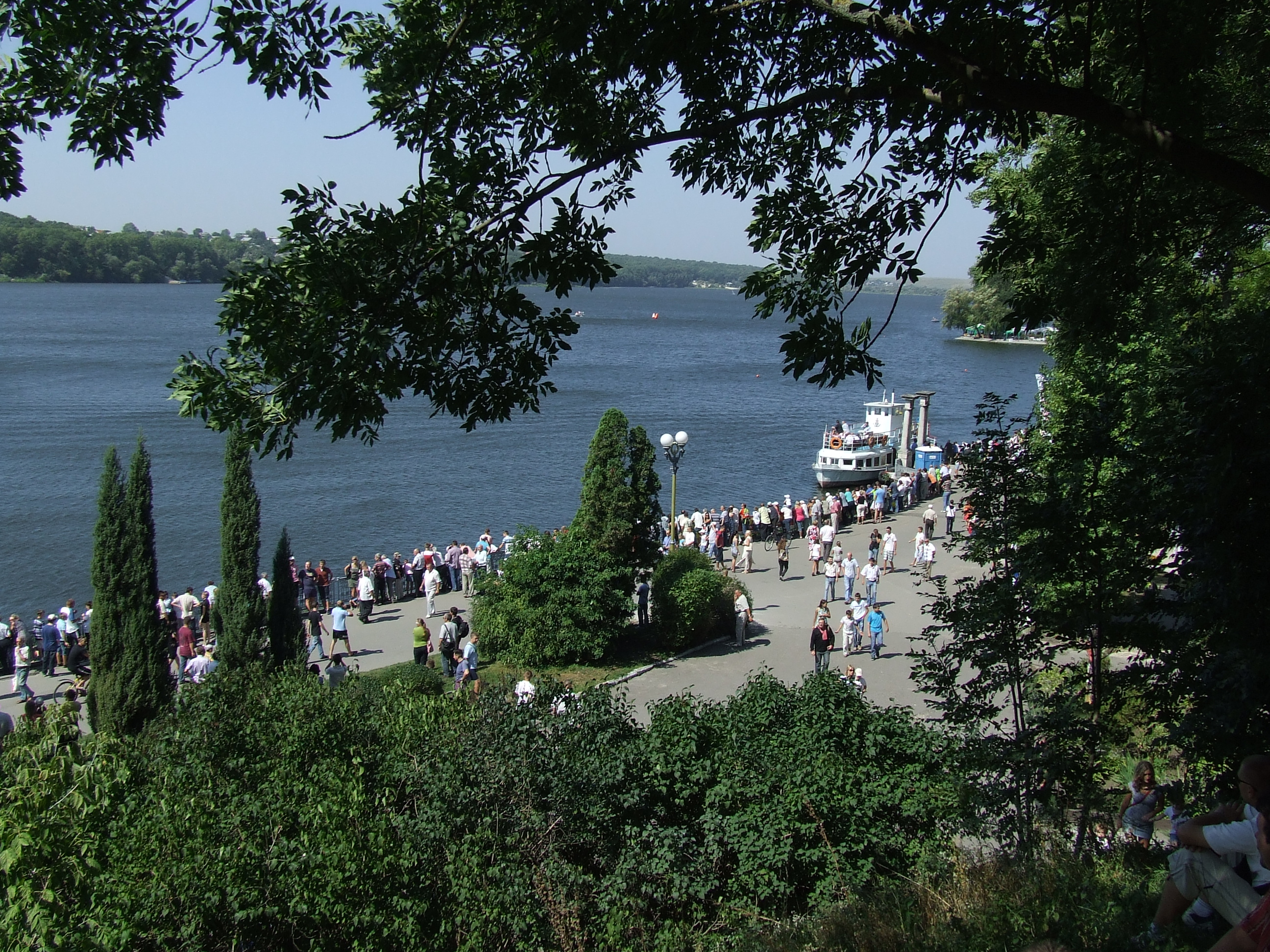 Набережна Тернопільського ставу в парку імені Тараса Шевченка.